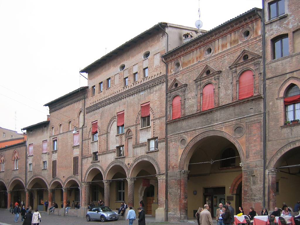 Palazzi medievali e rinascimentali in Piazza Santo Stefano a Bologna, Italia.